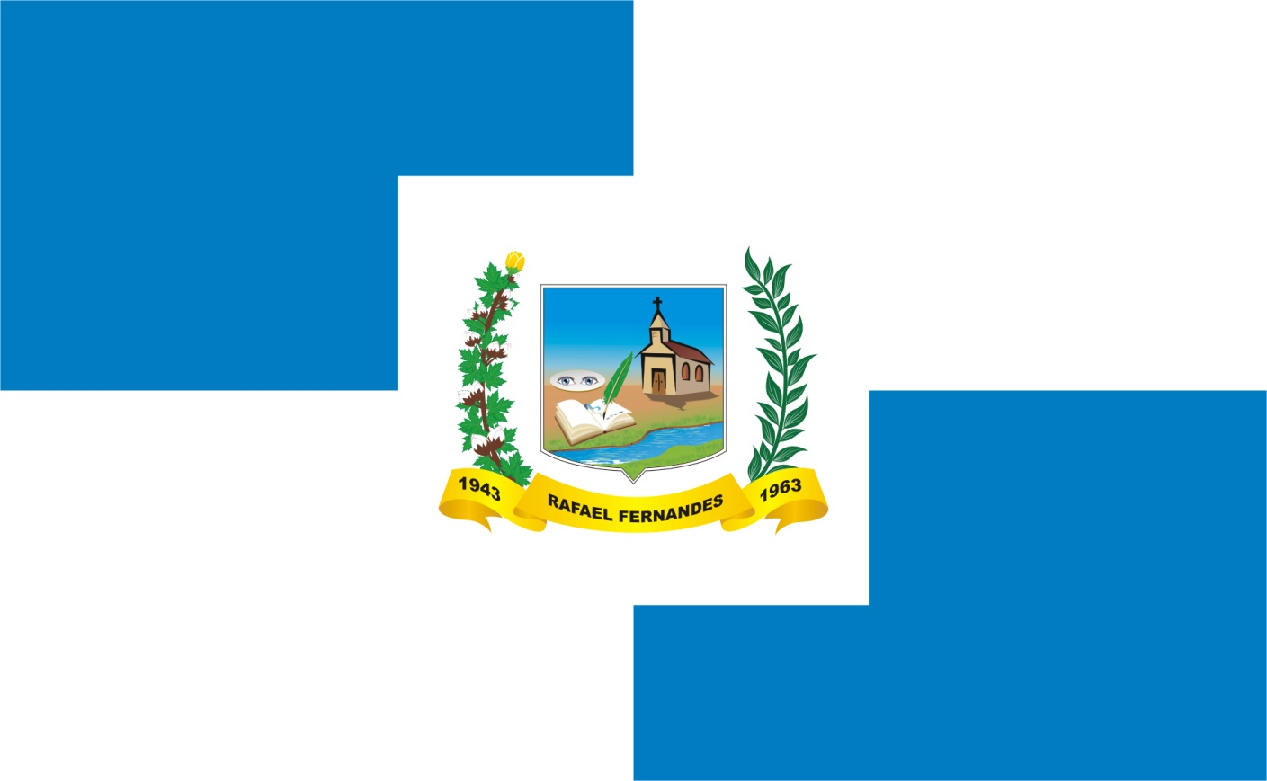 Bandeira de Rafael Fernandes-RN, Brasil